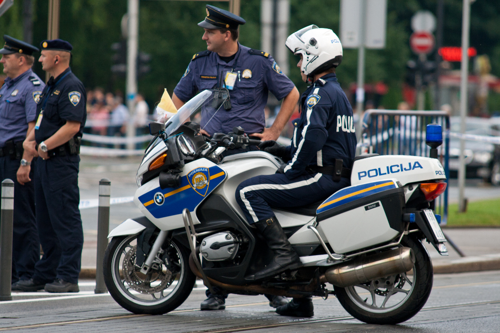 Hrvatska policija na zagrebačkim ulicama tijekom dvodnevnog apostolskog posjeta pape Benedikta XVI. Hrvatskoj.